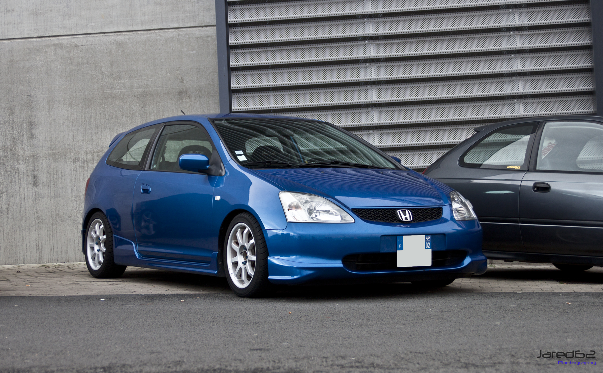 Honda Civic EP3 2.0 K20A 200cv